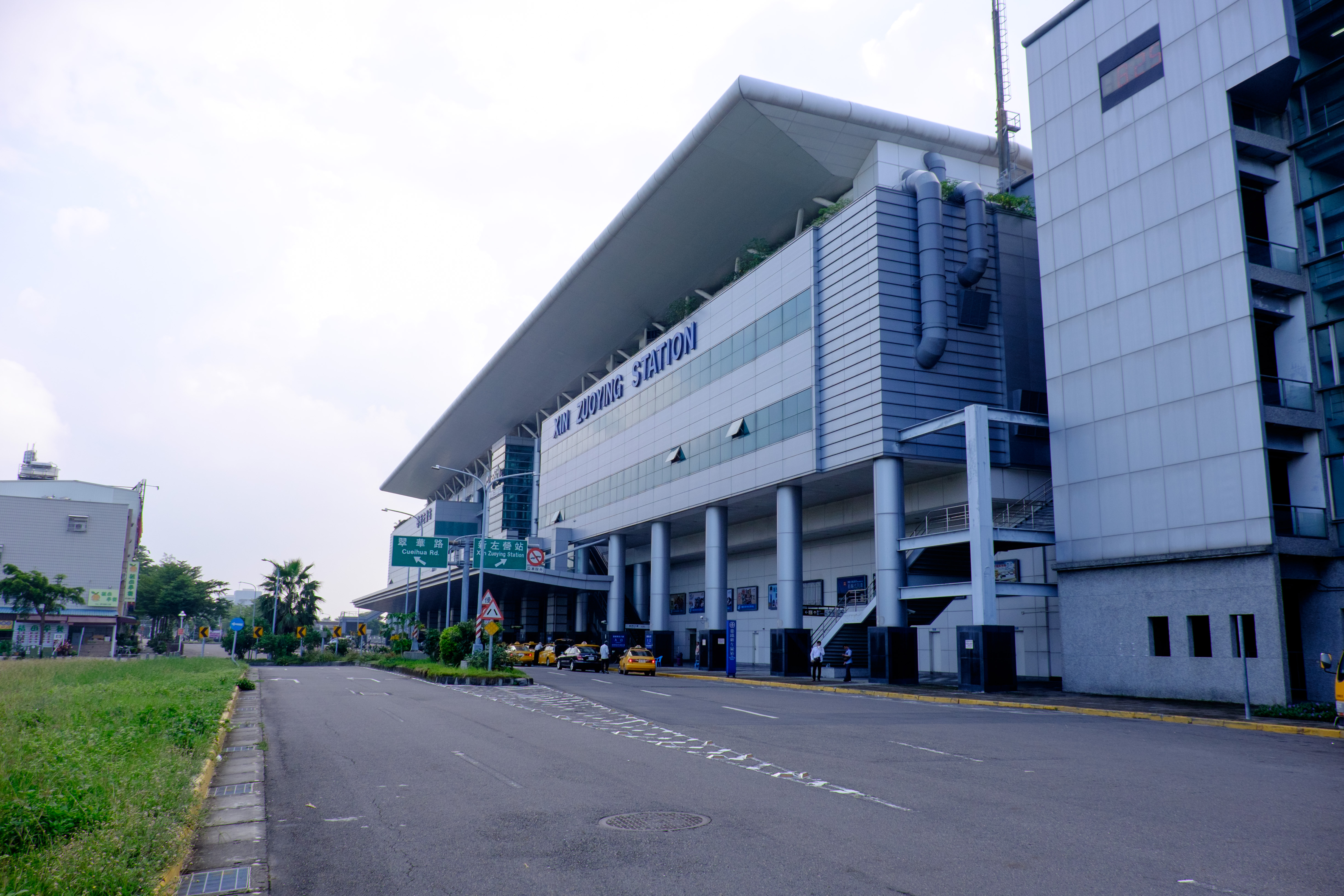 清晨的臺鐵新左營車站。